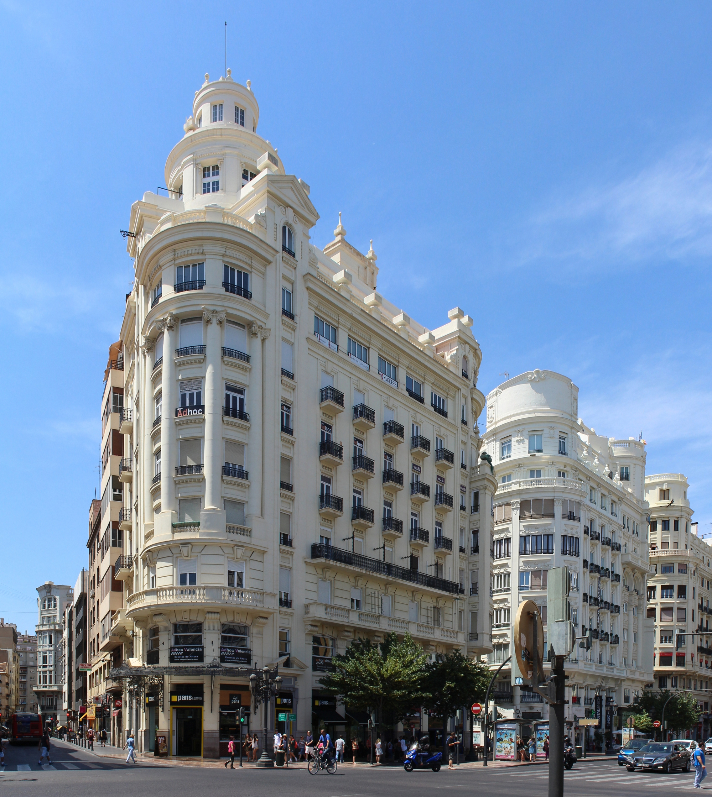 Edificio Barrachina de Francisco Javier Goerlich Lleó con la colaboración de Francisco Almenar en Valencia